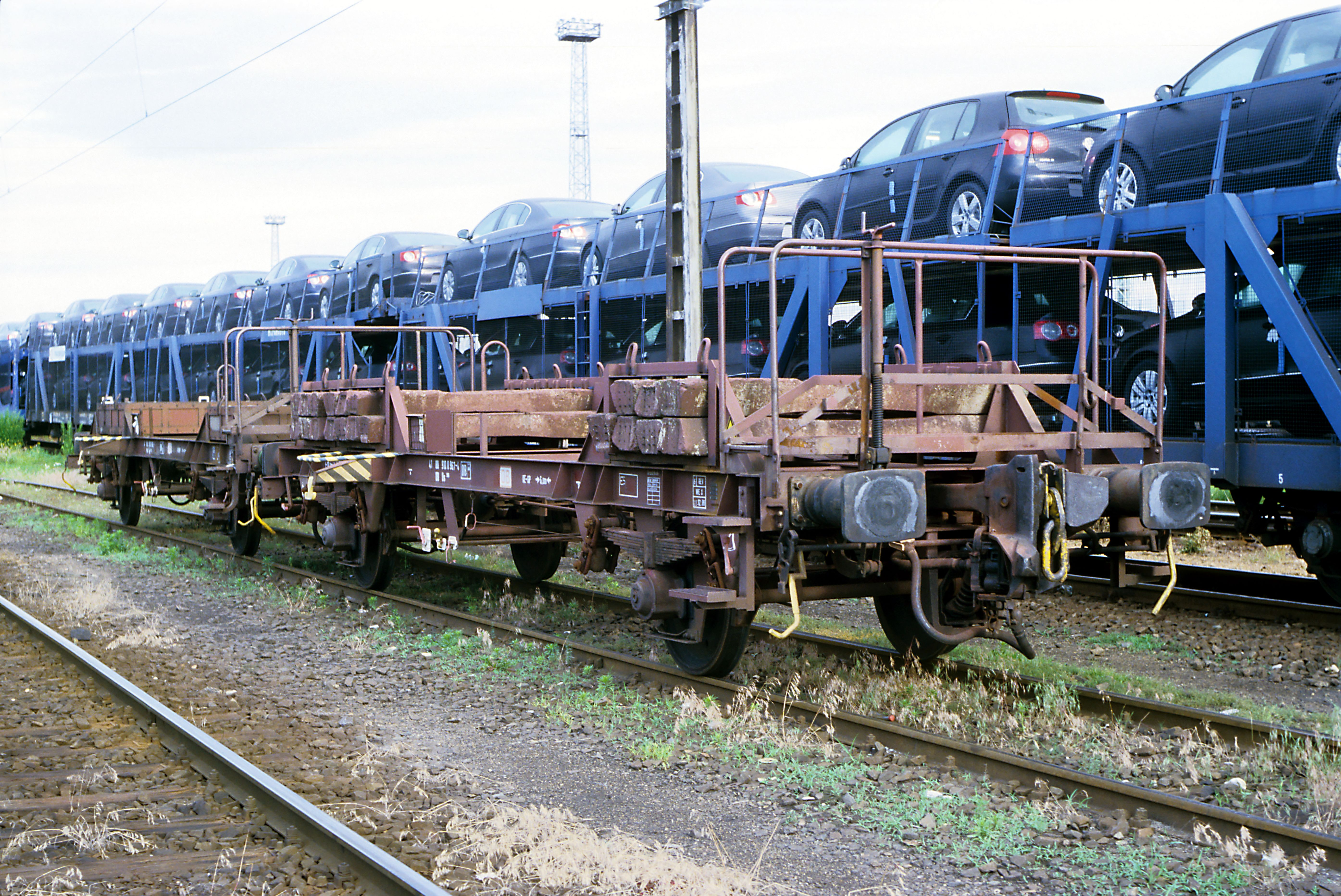 ursprünglich mit SA3-Kupplung für in Mukran umgespurte russische Güterwagen gebaut. Die Seite mit der größeren Ballastmasse trug die SA3-, die andere die Schraubenkupplung. Betonschwellen waren bereits vorhanden.